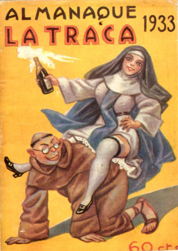 Almanac de La Traca